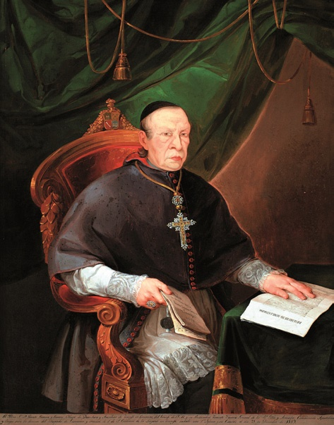 José Domínguez Bécquer, Vicente Román y Linares, catedral de La Laguna.